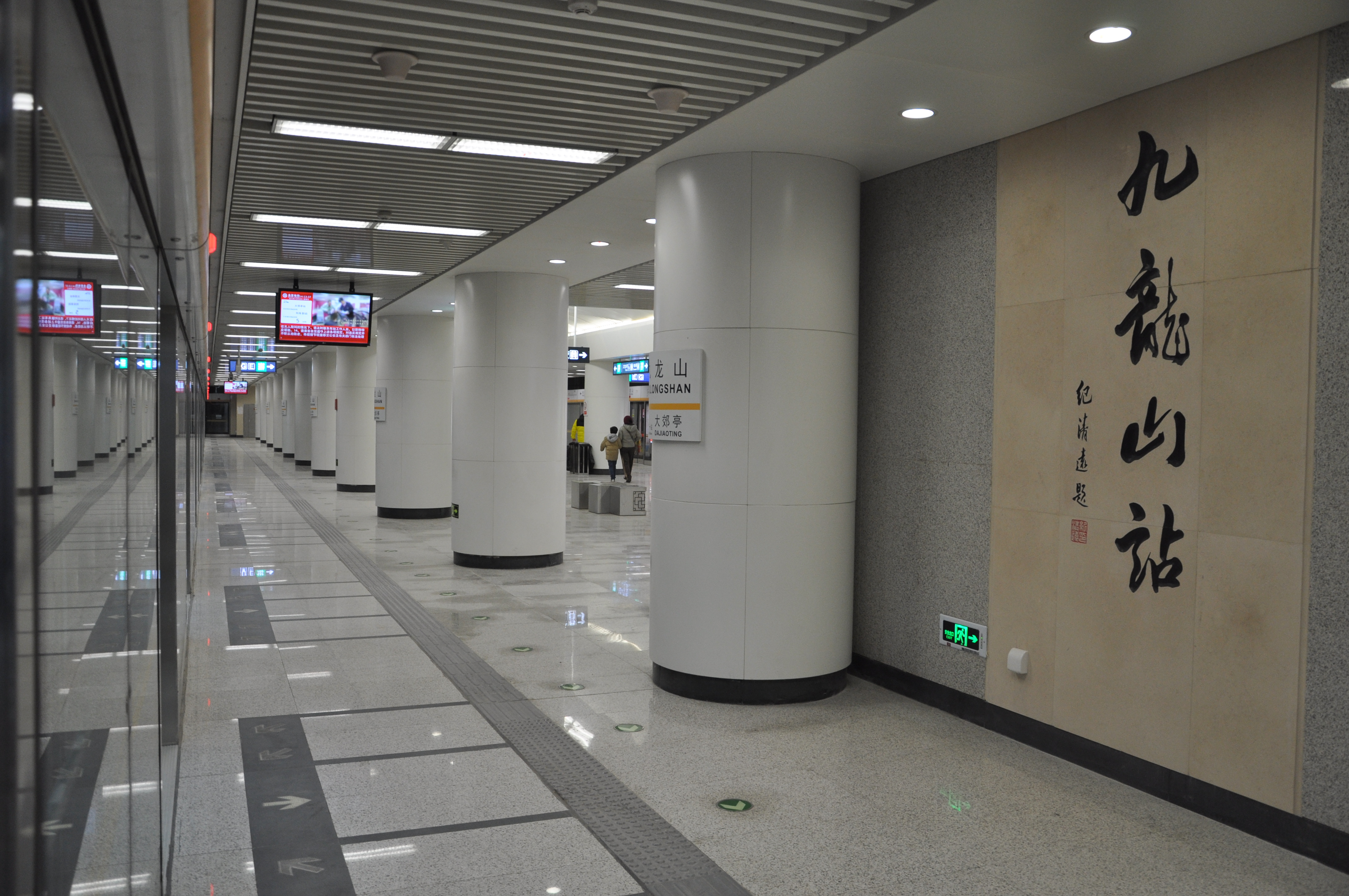 北京地铁7号线九龙山站站台。